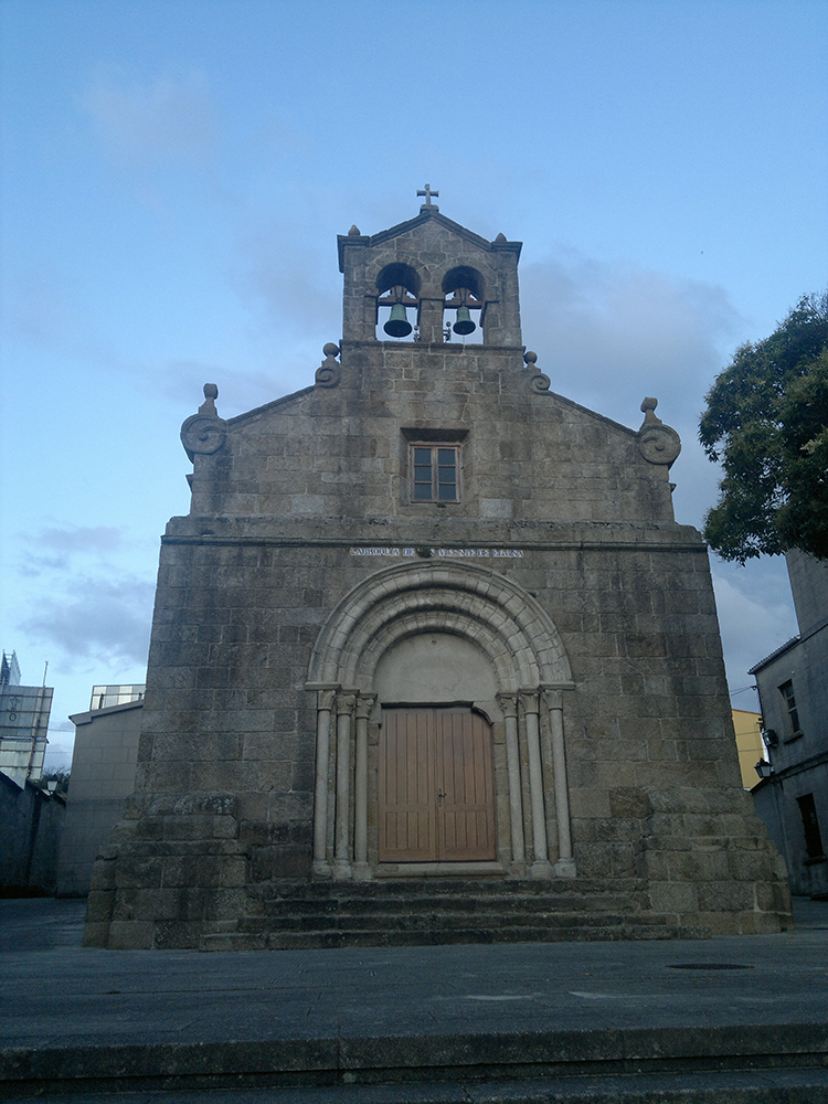 Igrexa de San Vicenzo de Elviña (Elviña, A Coruña)